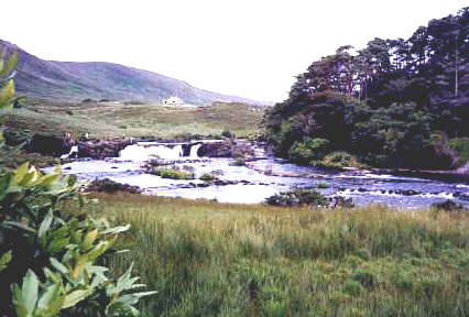 Wasserfall